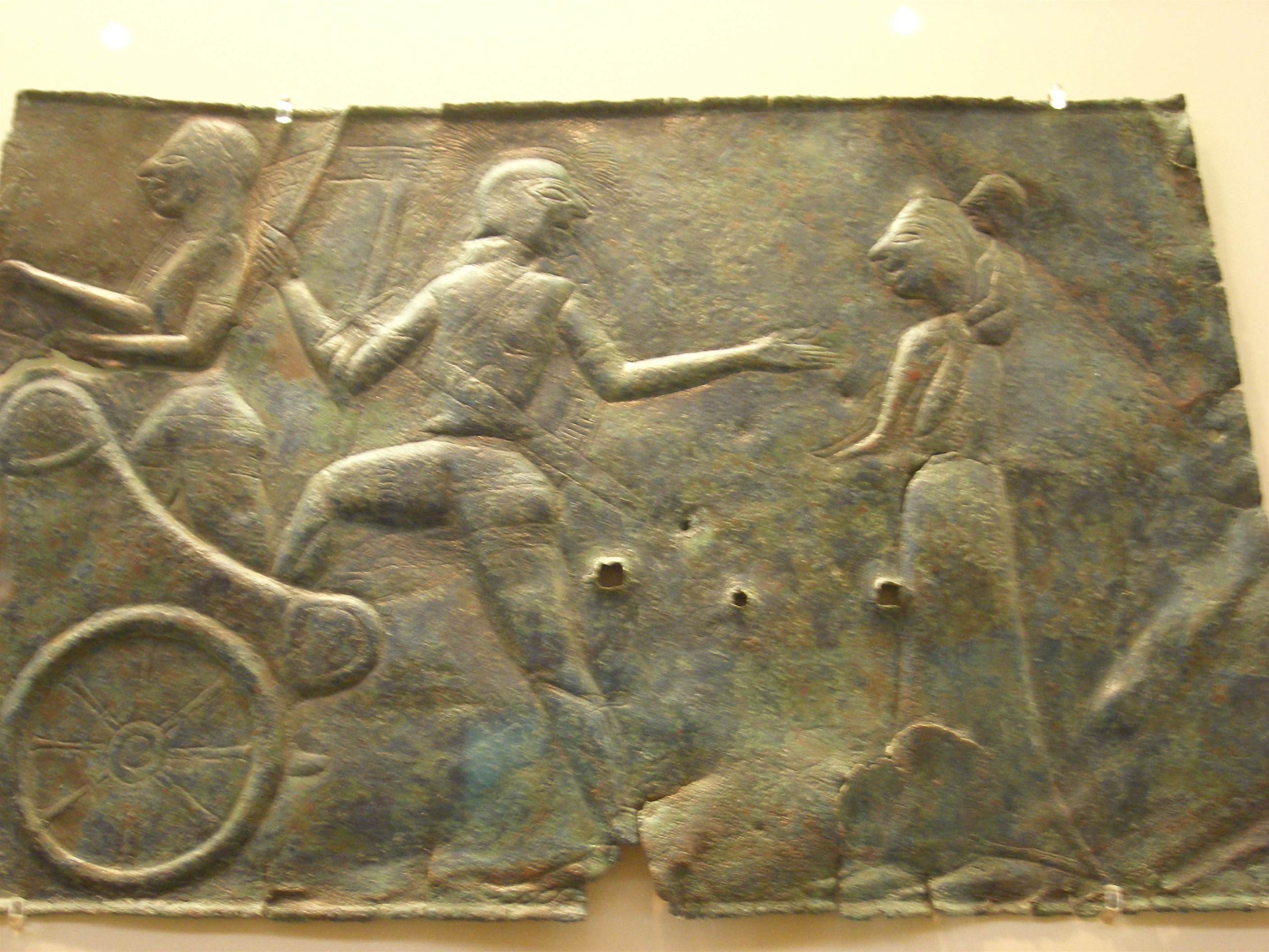 Plaque de bronze martelée. Scène de départ d'un guerrier (peut-être Amphiaraos). Atelier d'Ionie (Asie mineure). 580 avant J.C